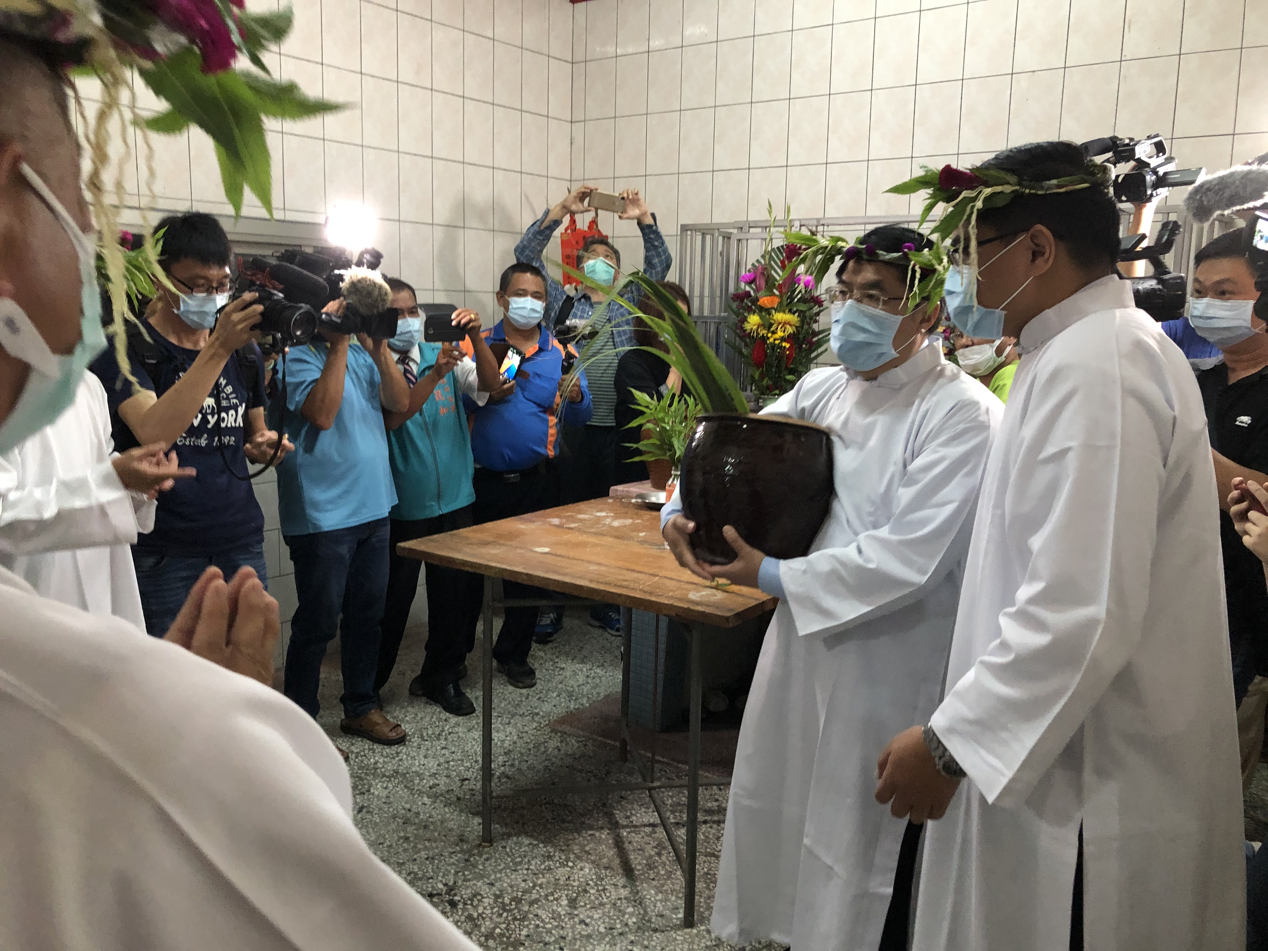 2020年北頭洋夜祭前，位於北頭洋立長宮的請壺儀式。由臺南市長黃偉哲進行請壺儀式。